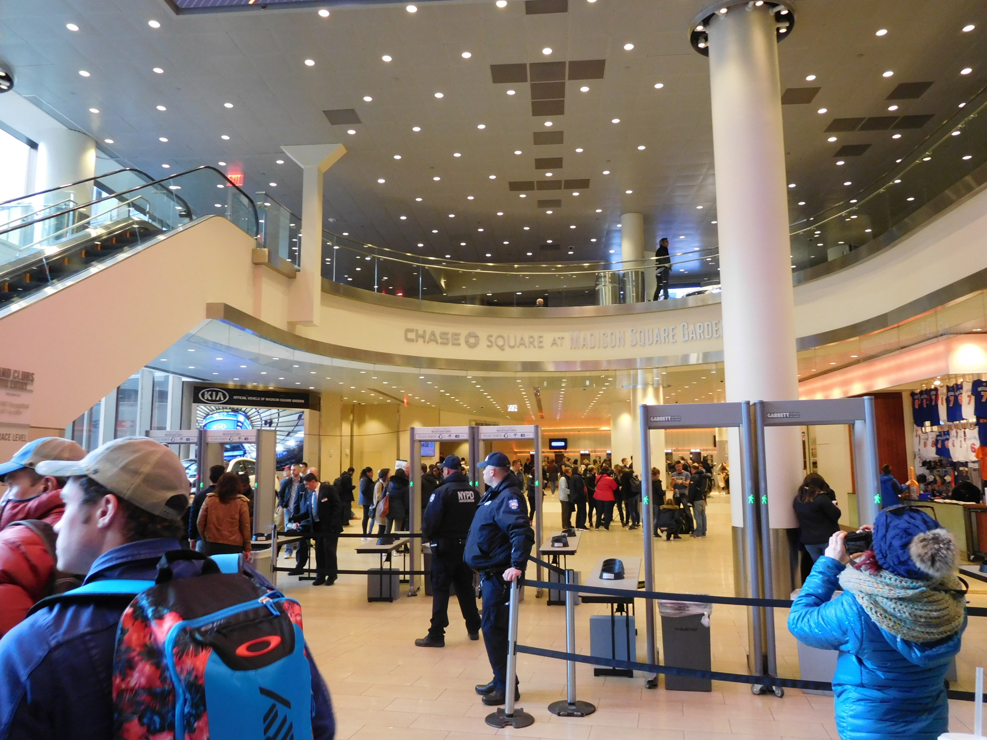 麥迪遜花園廣場大廳